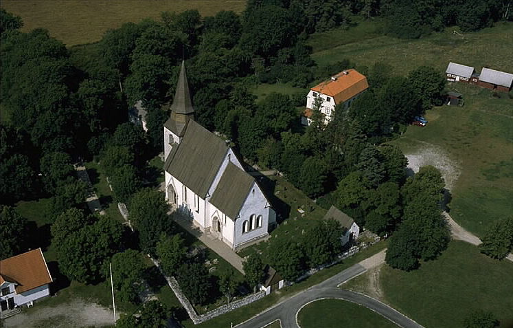 Motiv: Fole kyrka Nyckelord: Flygbilder, Riksintressen Kategori: KyrkomiljöFole kyrka